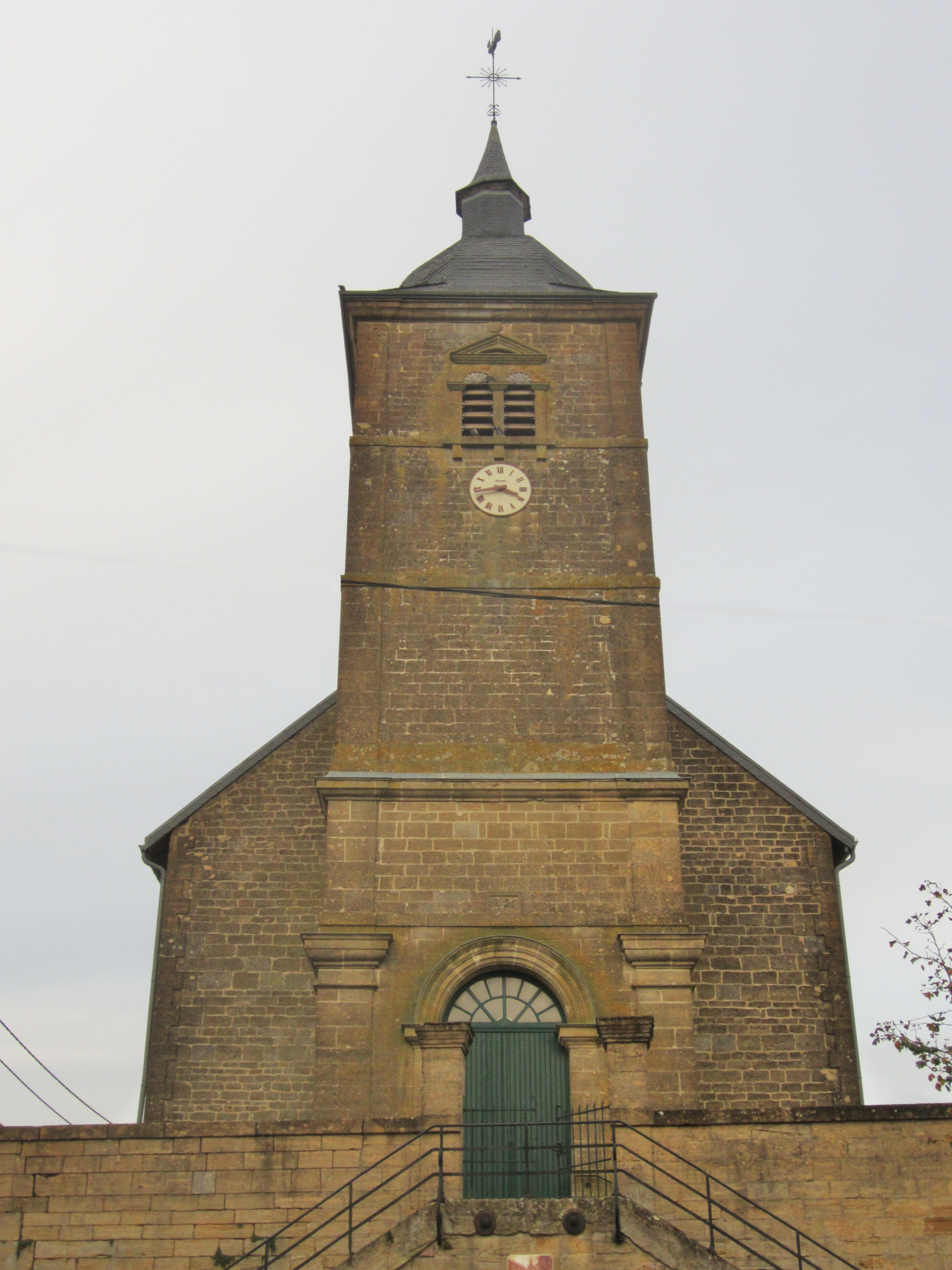 Description eglise Ville au Montois eglise Ville au Montois